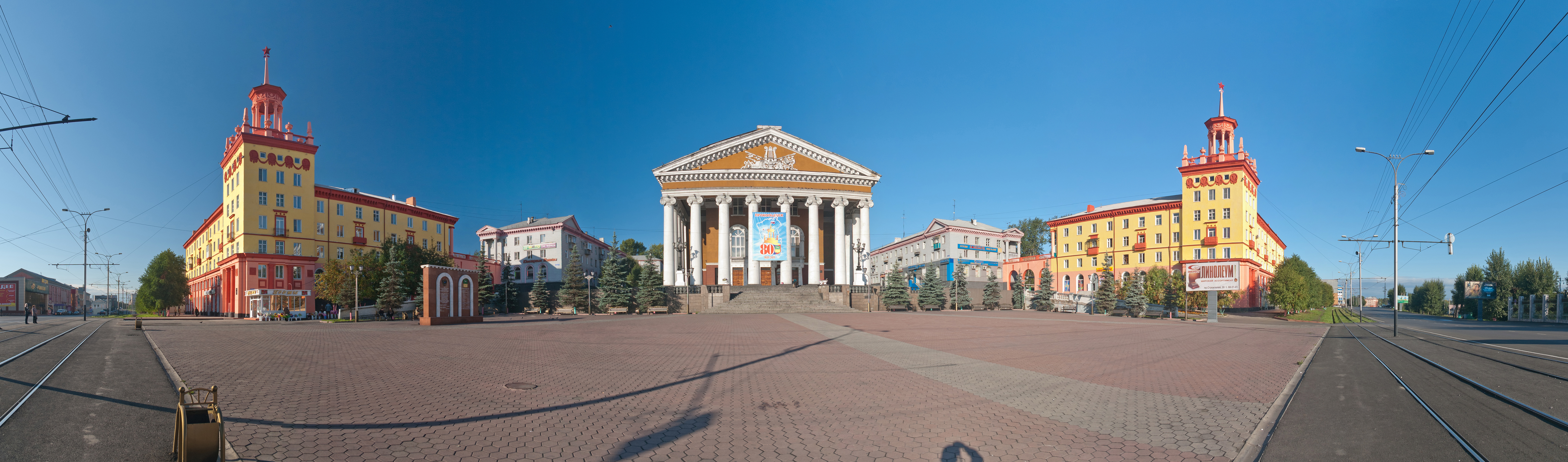 Площадь перед драматическим театром, 27 августа 2011 г., панорама из 6 кадров.